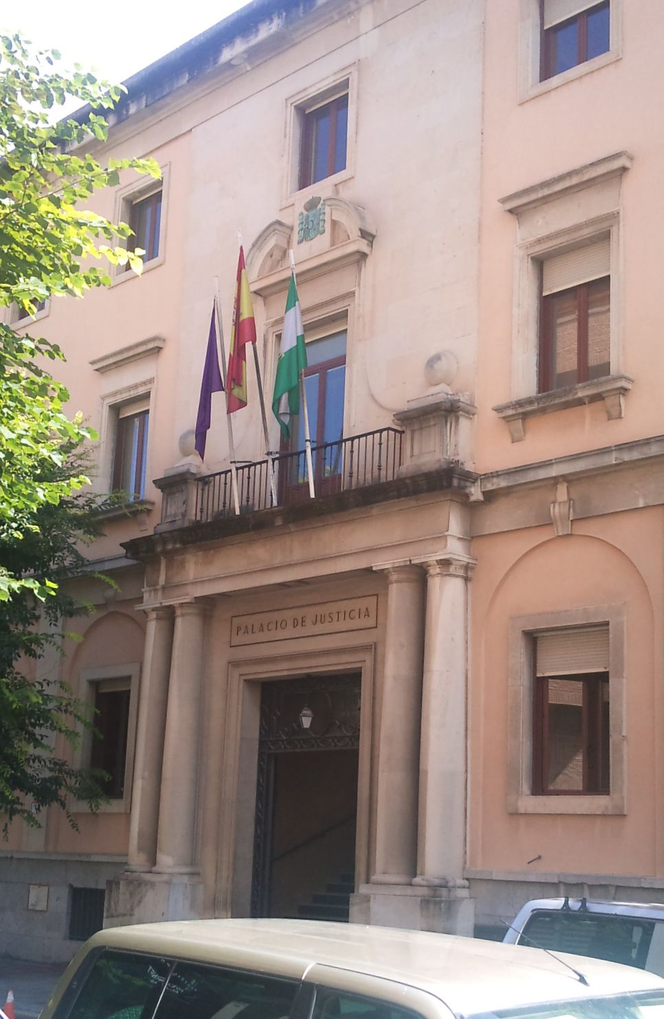 Fachada principal del Palacio de Justicia de Jaén, sede de la Audiencia Provincial. Se encuentra en la calle del Arquitecto Berges.